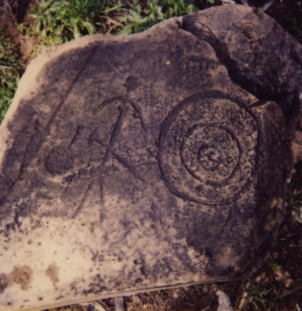 En Almodóvar del Campo esta estela